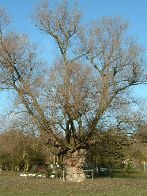 Seckbacher Ried, a wilderness park in Frankfurt-Seckbach; Landschaftsschutzgebiet gehört zum Frankfurter Stadtteil Seckbach. Es erstreckt sich südlich von Seckbach und grenzt direkt an Bergen Enkheim und Riederwald.